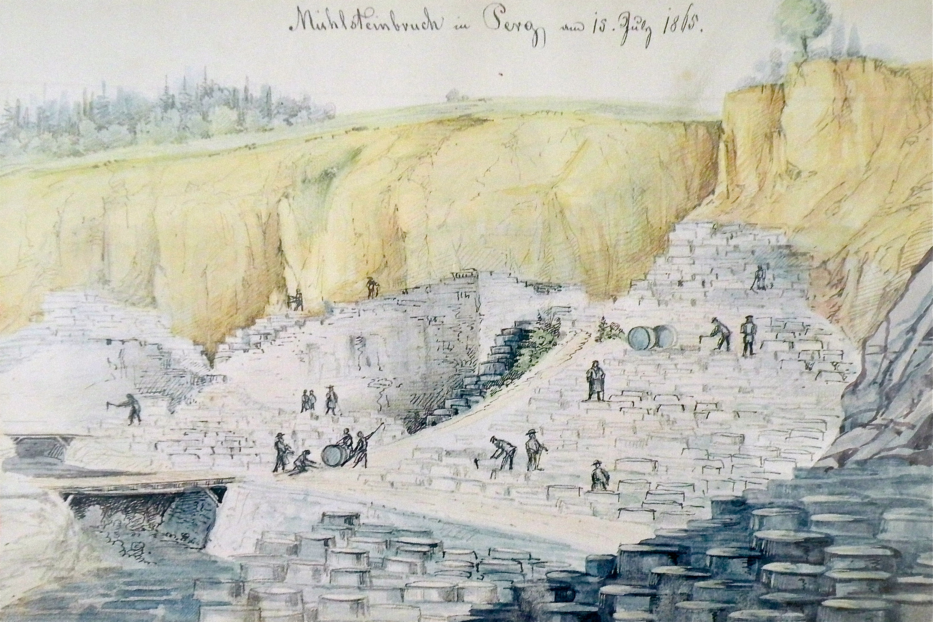 Fotografie einer Zeichnung des Mühlsteinbruchs Scherer in Perg 1865